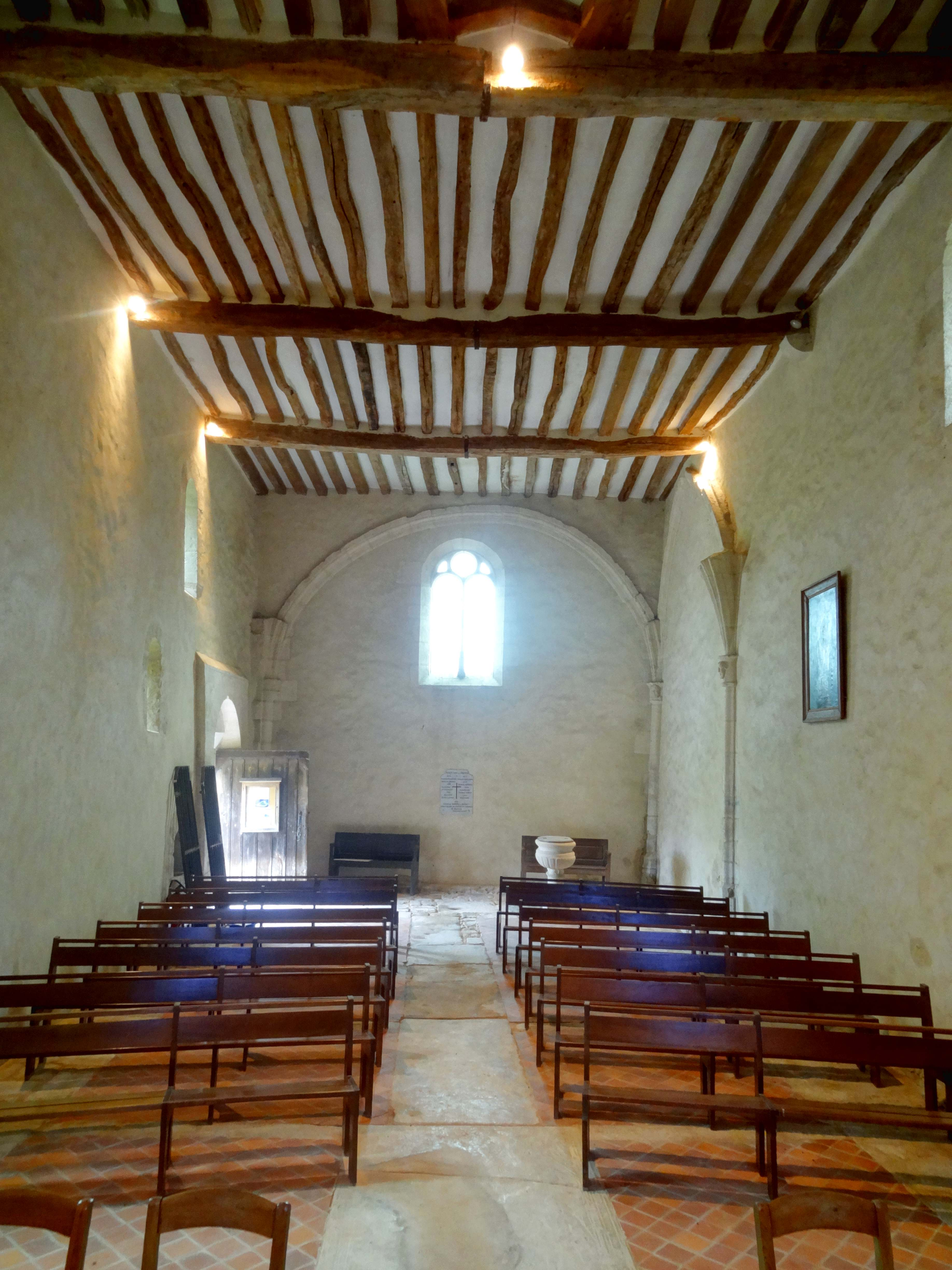 Intérieur de l'église - voir titre.